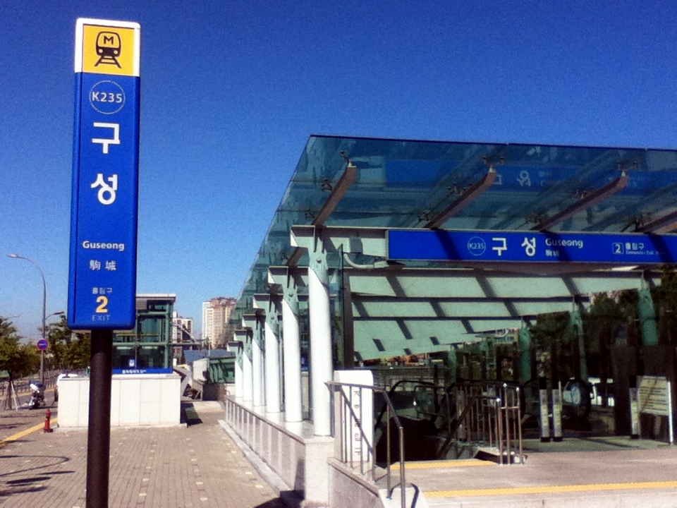 한국철도공사 구분당선 K235 구성역 2번 출구